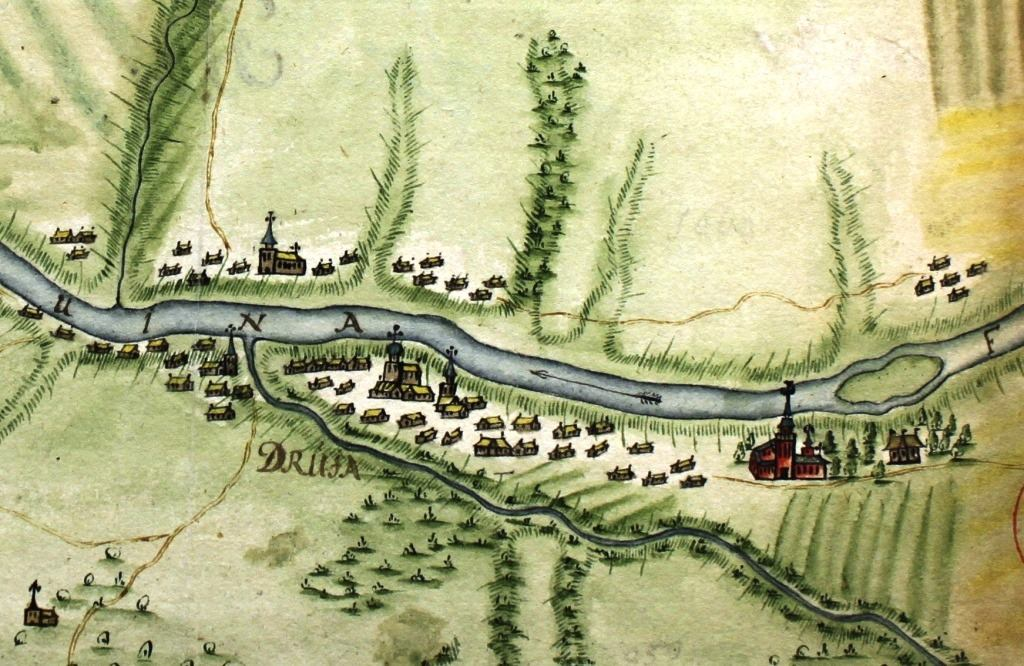 Беларуская (тарашкевіца): Друя (Druja). Плян места, падобны да пляну Горадні